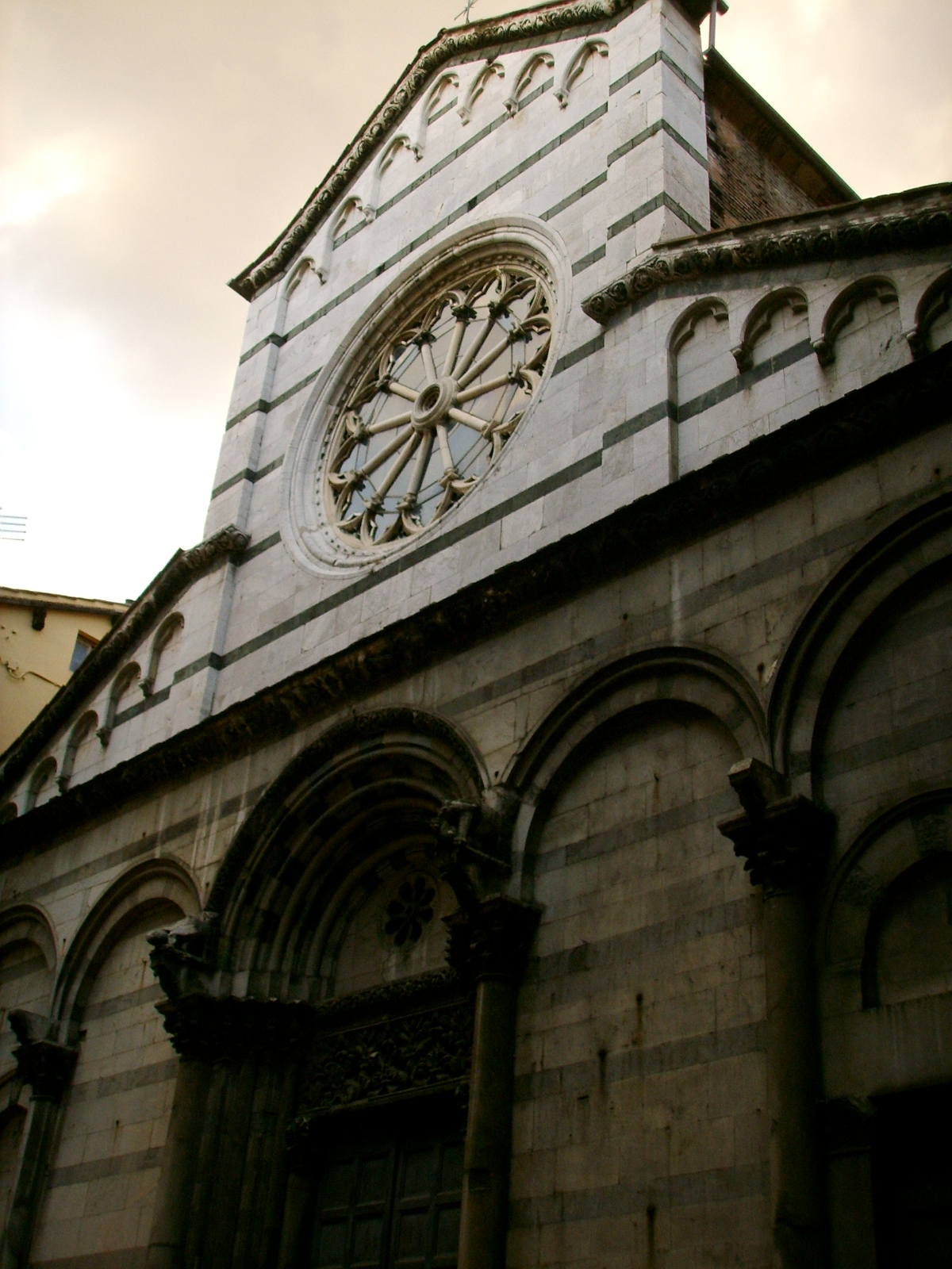 Chiesa di san cristoforo lucca